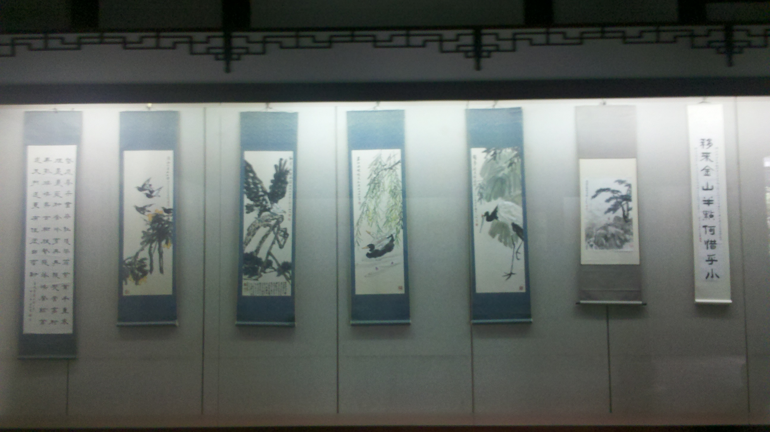 扬州八怪纪念馆，位于江苏省扬州市瘦西湖风景区，为纪念清朝扬州八怪“郑燮、罗聘、黄慎、李方膺、高翔、金农、李鱓和汪士慎”而建立的纪念馆。此图为纪念馆的扬州八怪书法绘画作品。